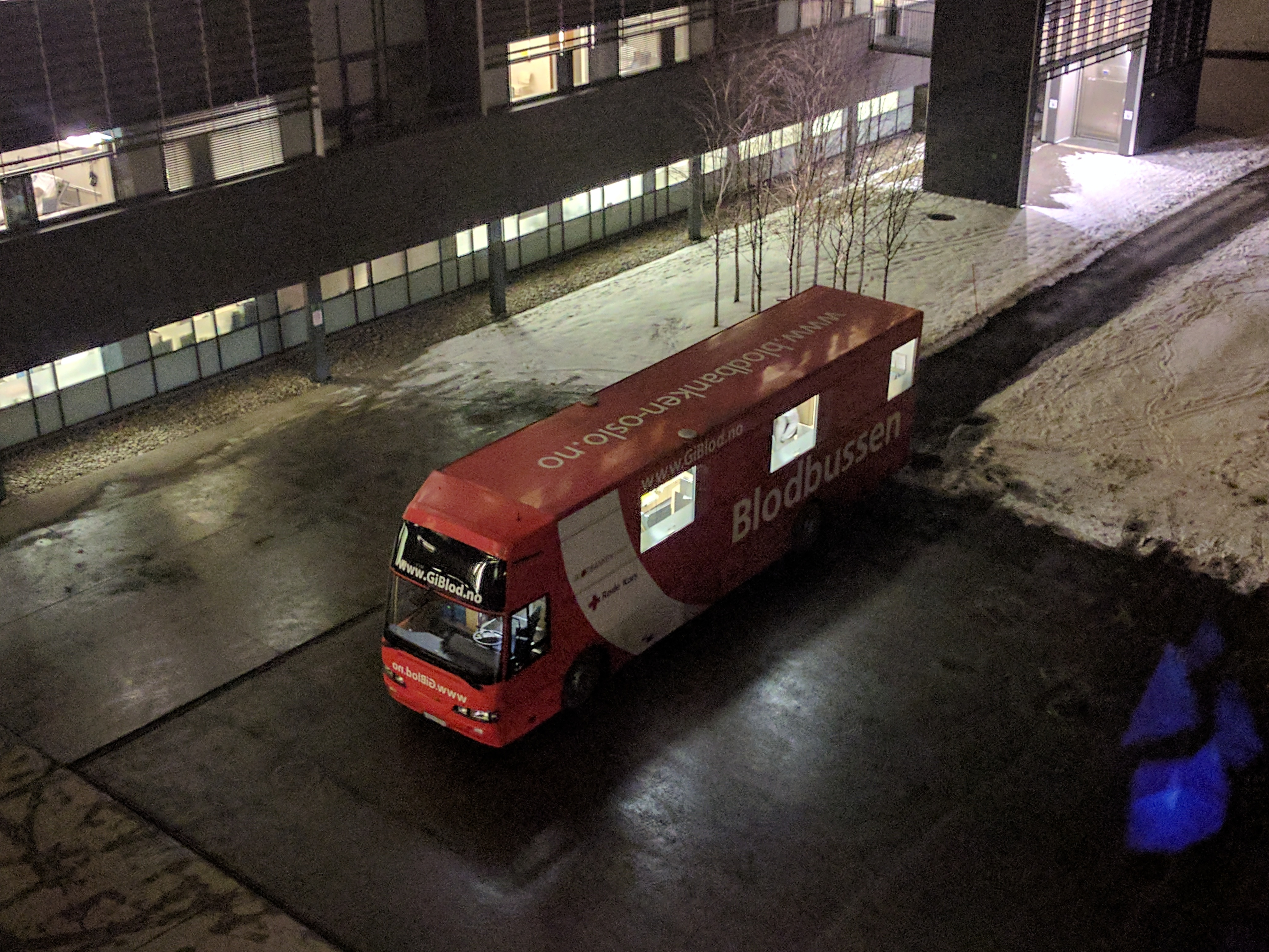 Blodbussen parkert utenfor Ahus.